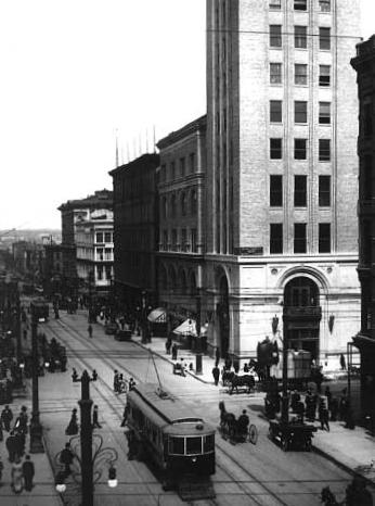 Il s'agit de la 16th rue de Denver prise en photo en 1912